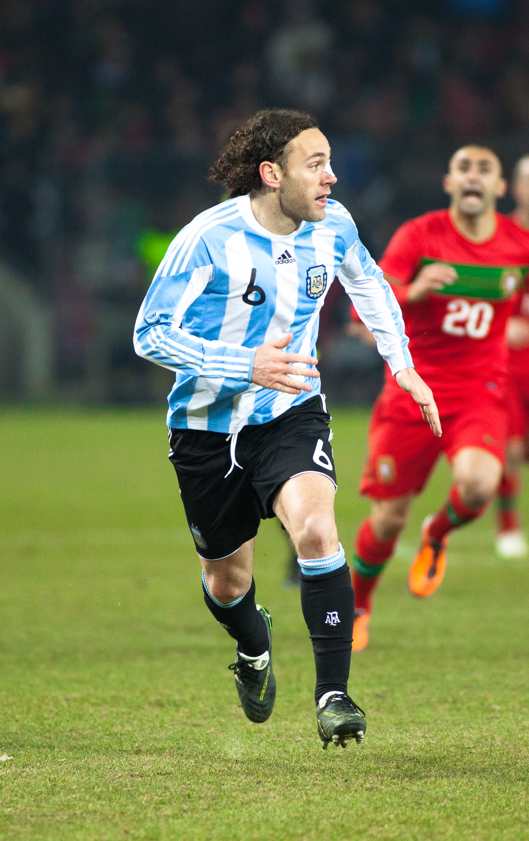 Gabriel Milito lors d'un match amical Argentine - Portugal.